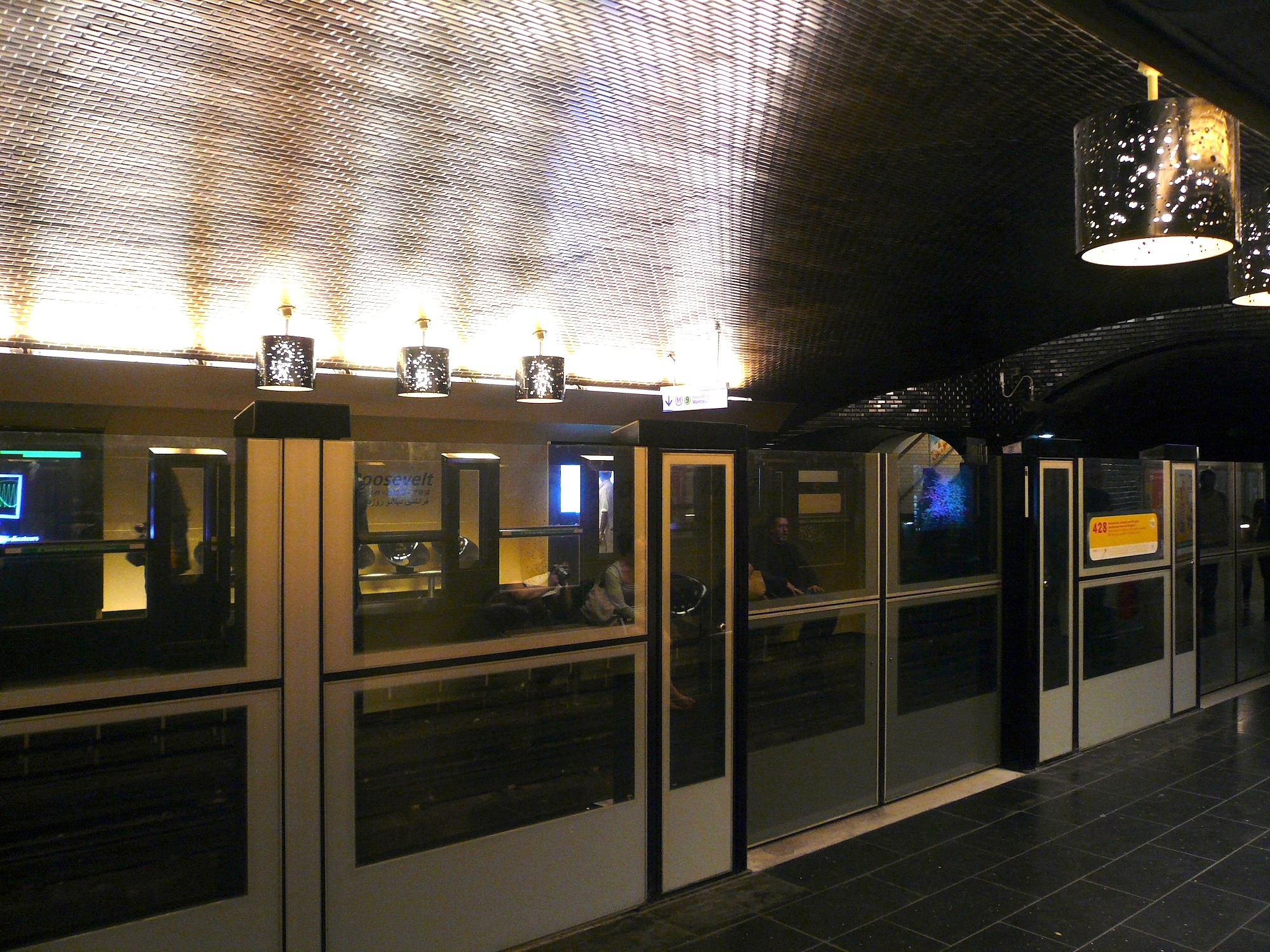 Nouvel aménagement de la station Franklin D. Roosevelt du métro parisien